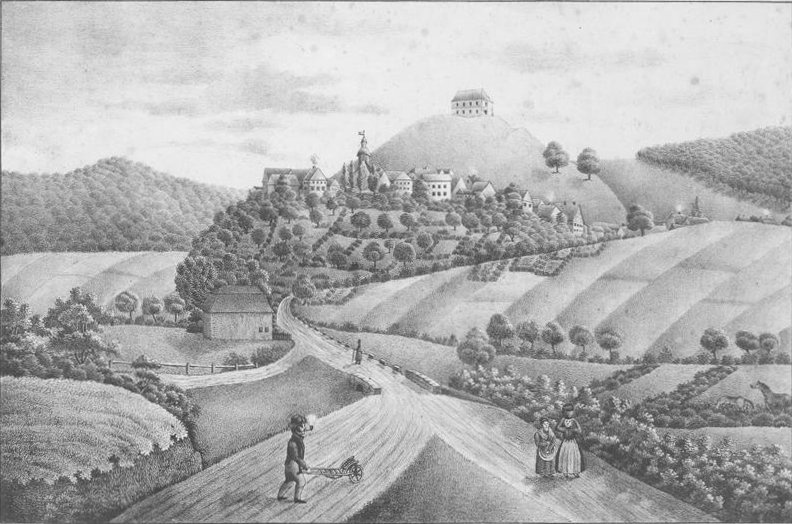 Schwalenberg um 1868